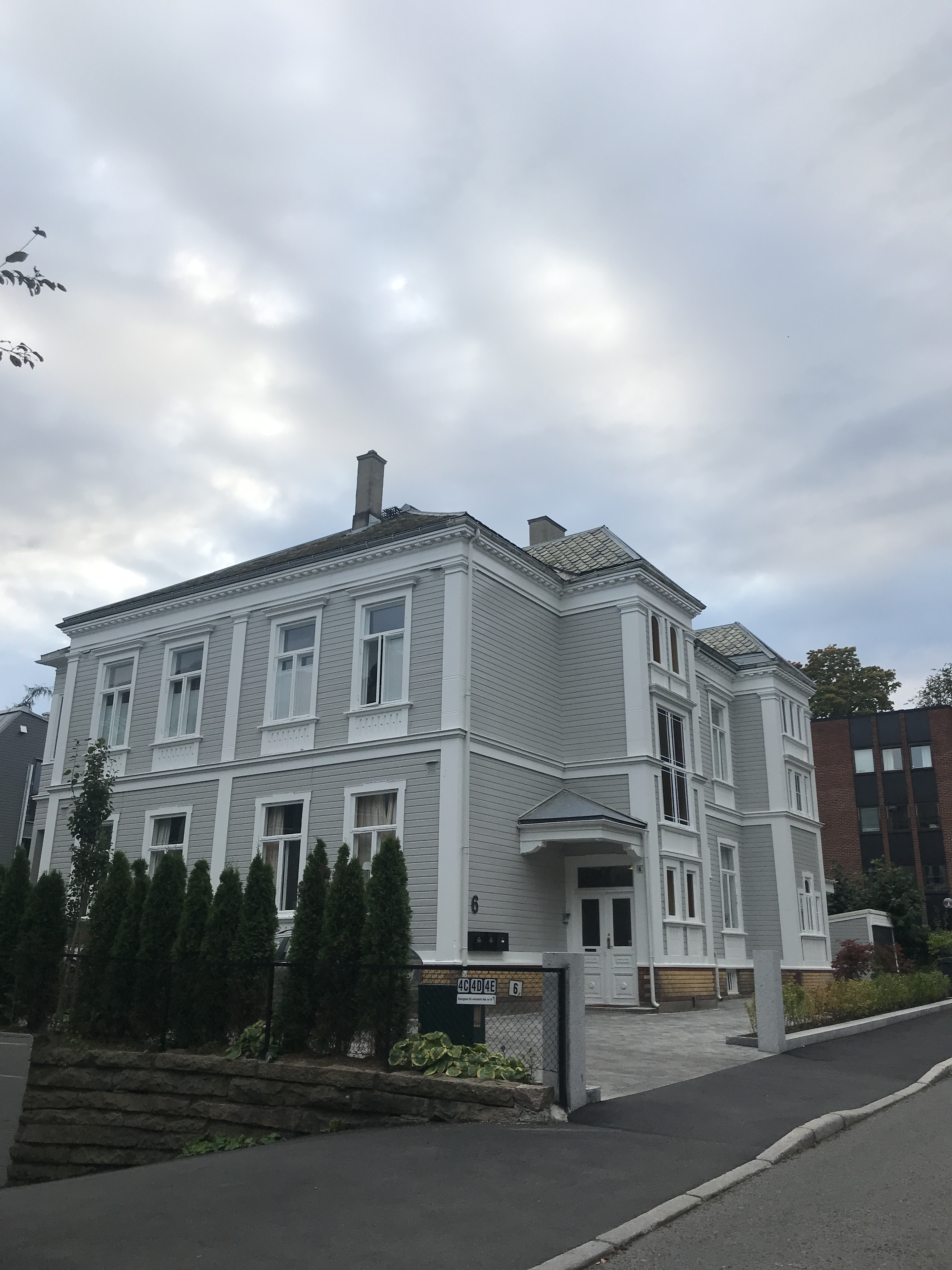 Frederik Stangs gate 6